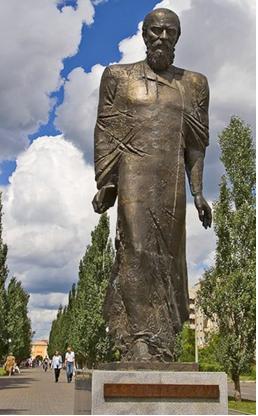 Памятник Ф.М. Достоевскому в Омске